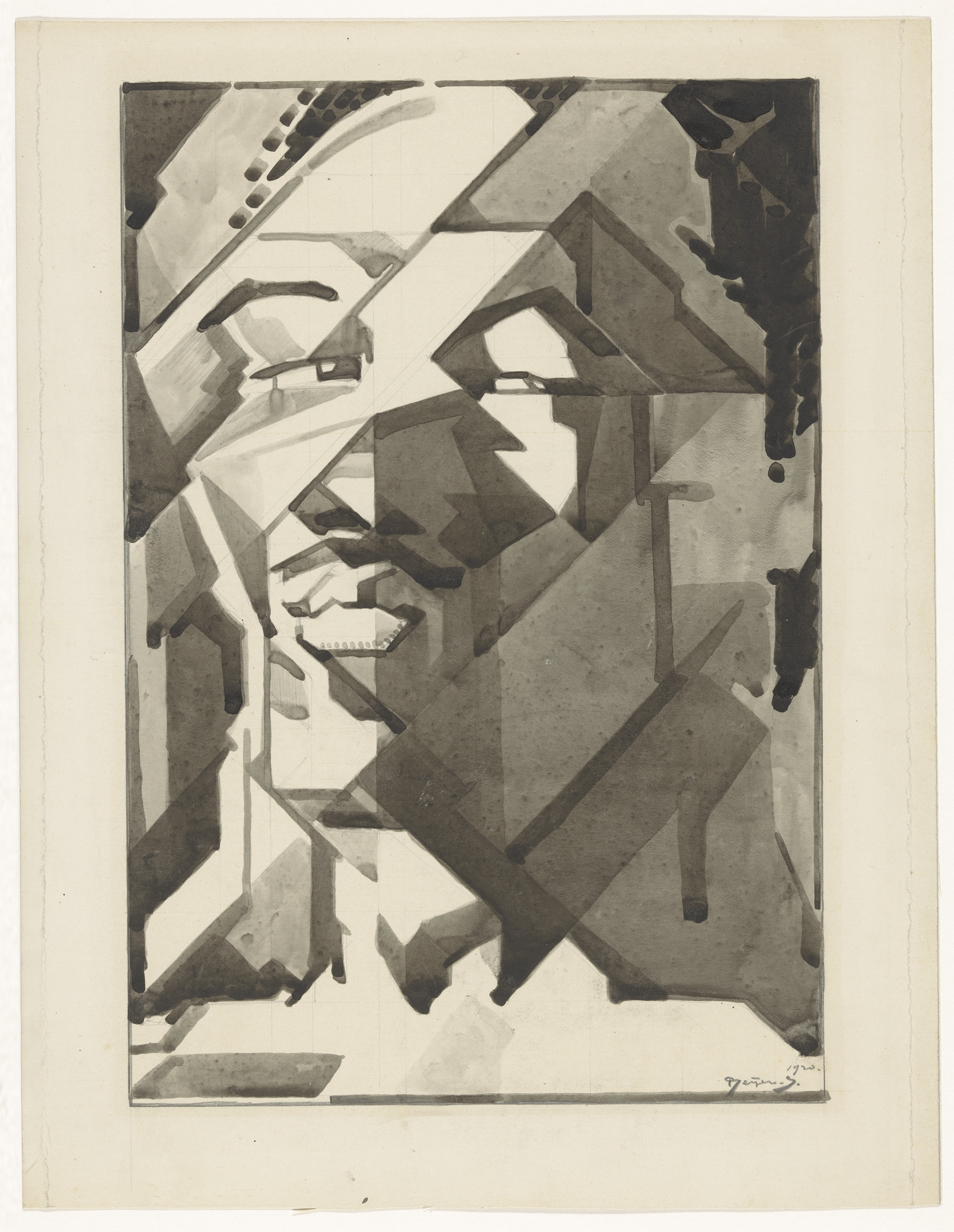 Zelfportret, Reijer Stolk, 1920 penseel in grijsbruin over potlood, h 322mm × b 249mm Opnamedatum: 2018-03-14